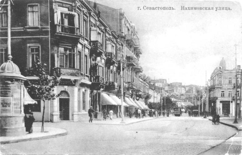 Проспет Нахімова в Севастополі на початку 20 ст.